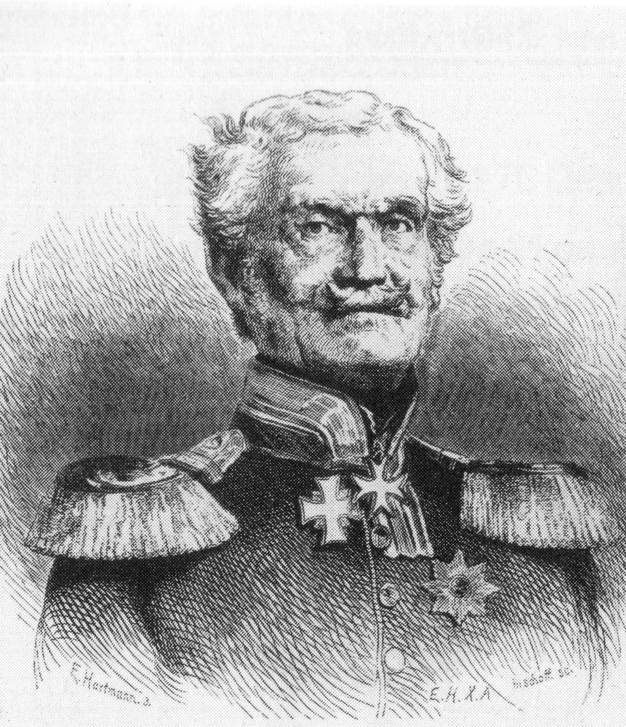 Holzschnitt von E. Hartmann. Friedrich Heinrich Ernst Graf von Wrangel, 1848.